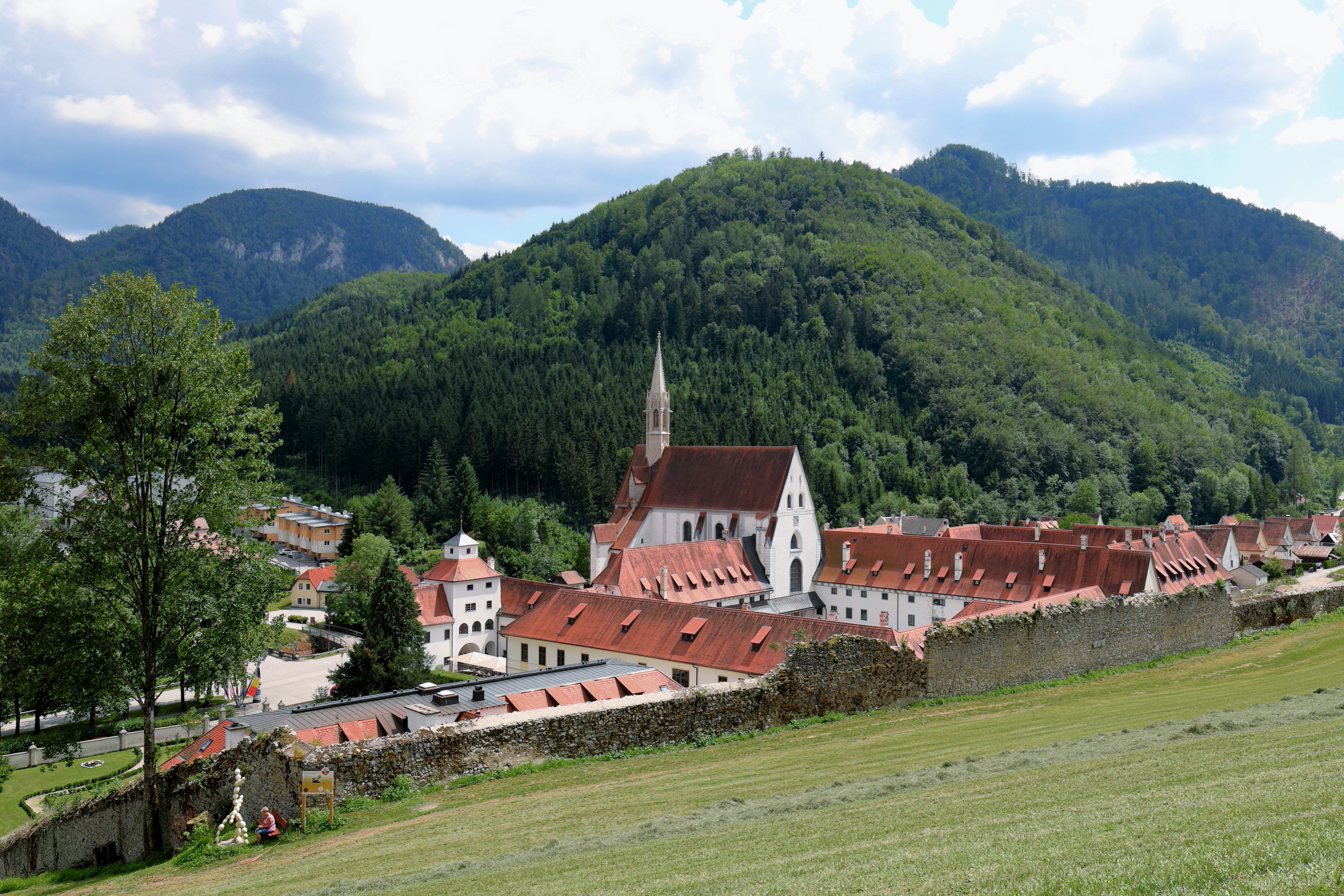 Nordansicht der Kartause Marienthron in der niederösterreichischen Marktgemeinde Gaming.Links das Dach des „Gartenhauses“, anschließend der Prälatenhof und dahinter die Klosterkirche, rechts von dieser das Dach des Bibliothekshofes und anschließend die ehemaligen Kartäuserzellen. Die größte Kartause der deutschen Ordensprovinz wurde ab 1332 errichtet und 1782 unter Kaiser Joseph II. aufgelöst.